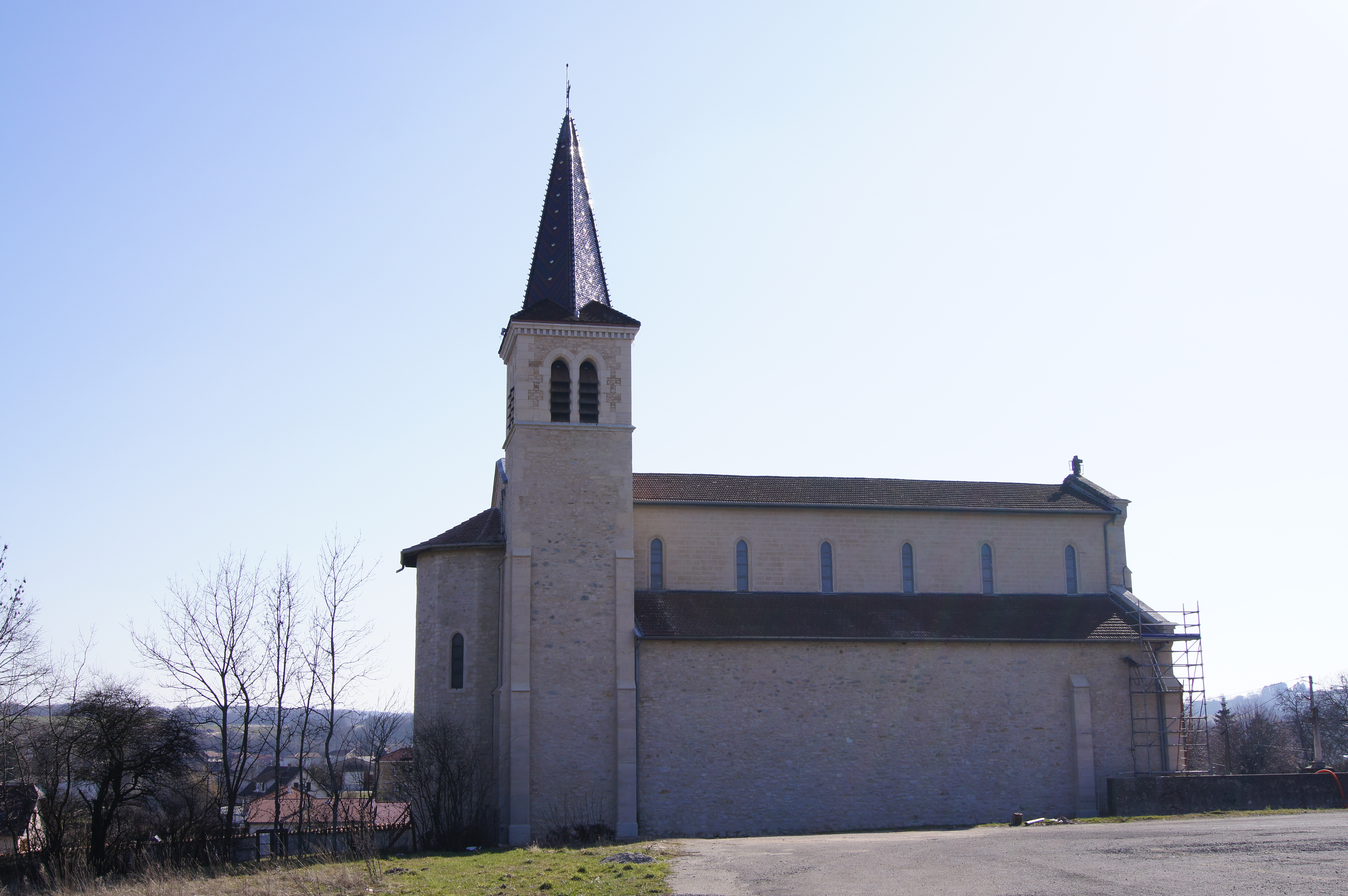 Eglise BADINIERES après rénovation en 2011